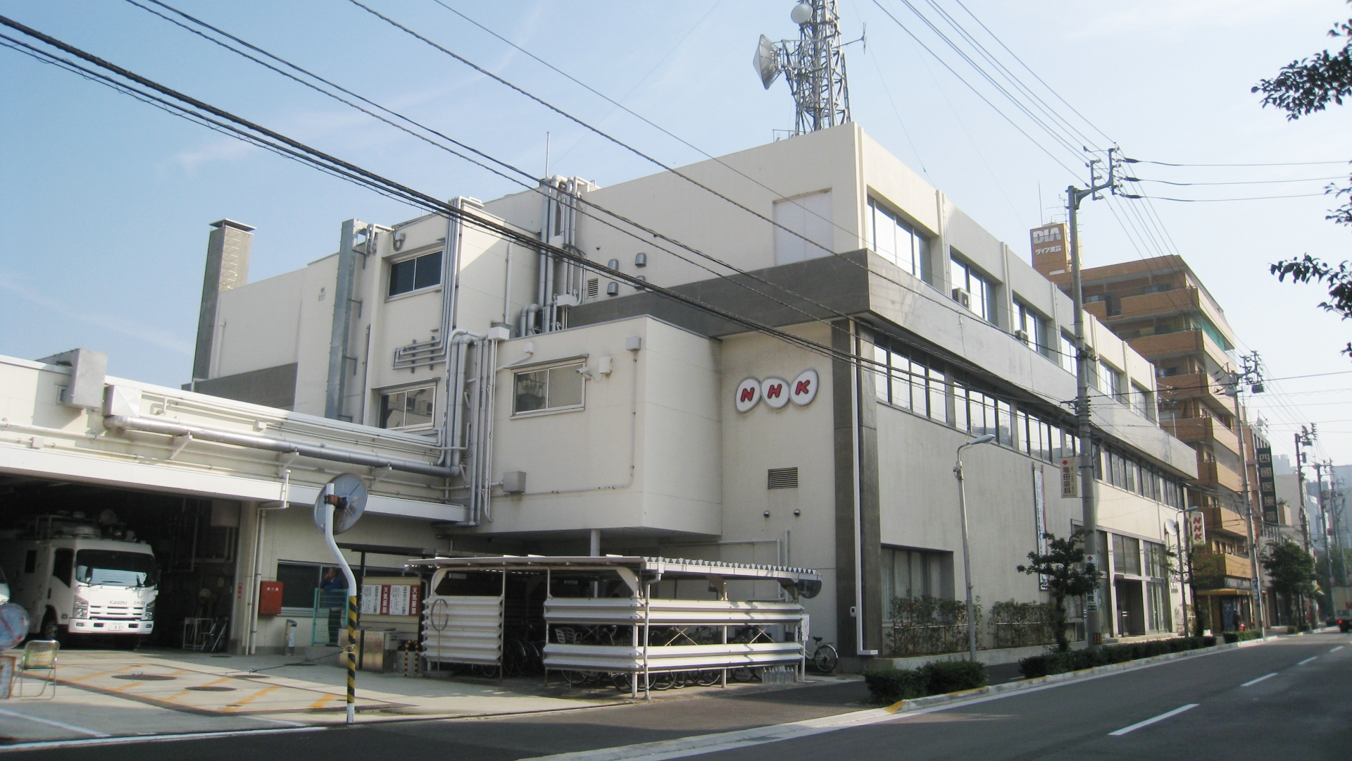 香川県高松市錦町にあるNHK高松放送局放送会館。